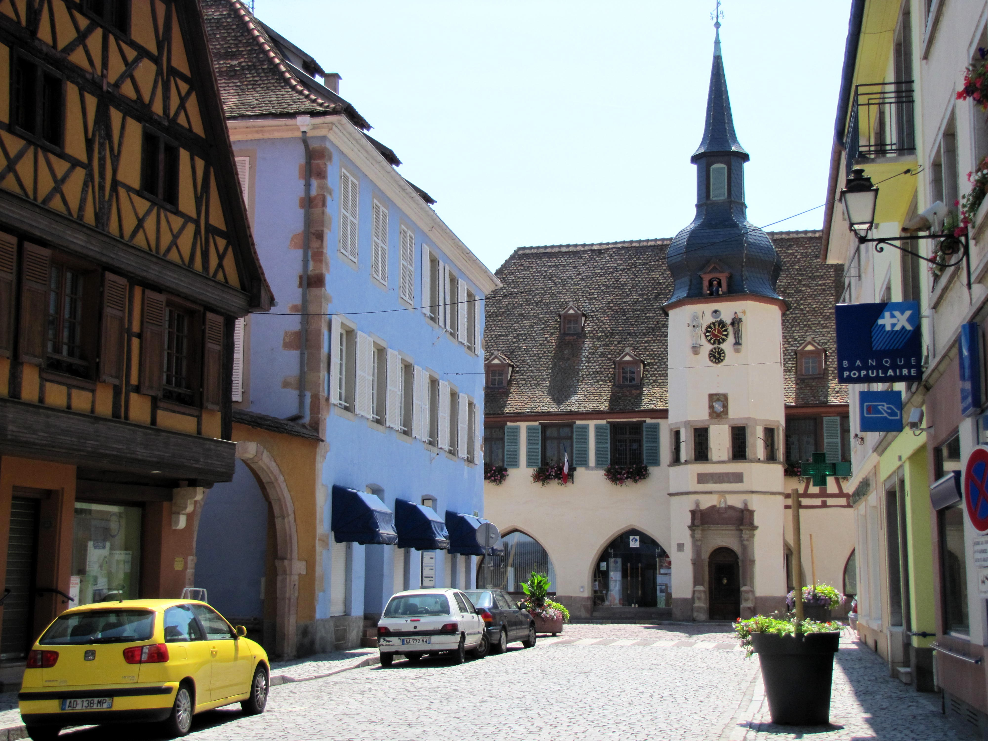 Alsace, Bas-Rhin, Benfeld, rue du Général De Gaulle vers l'Hôtel de Ville (1619), place de la Mairie (PA00084605, IA00023505).